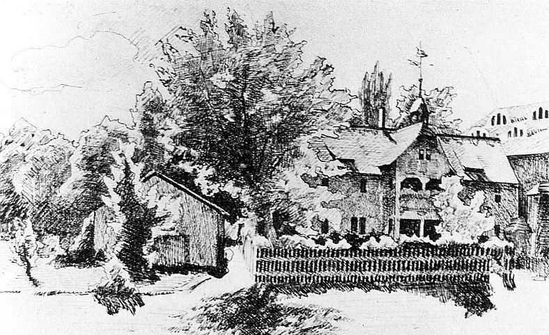 Original image description from the Deutsche Fotothek Dresden-Briesnitz. Weltemühle im Zschoner Grund, aus: Meiche 1927